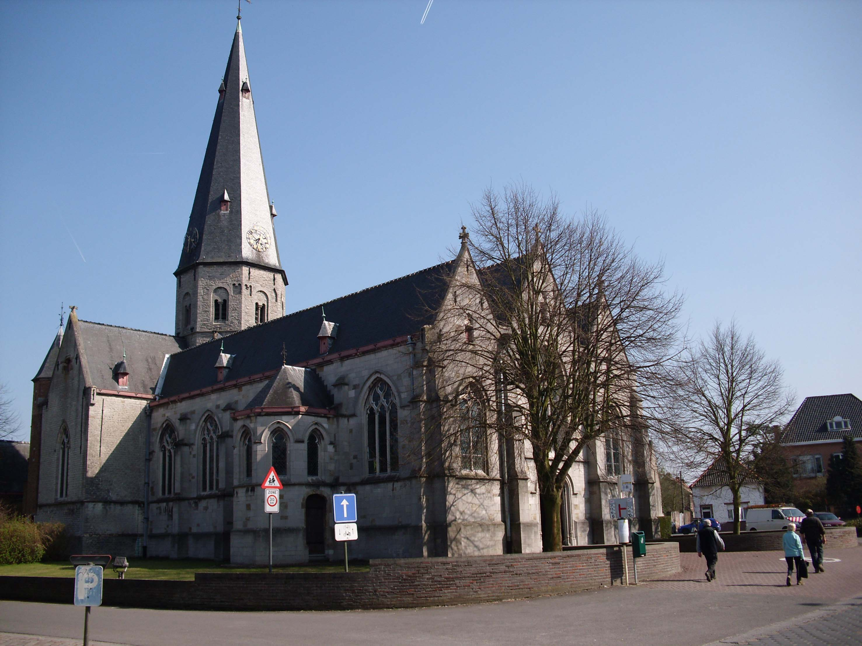 Kerk van Asper - Gavere - Oost-Vlaanderen - Vlaanderen - België